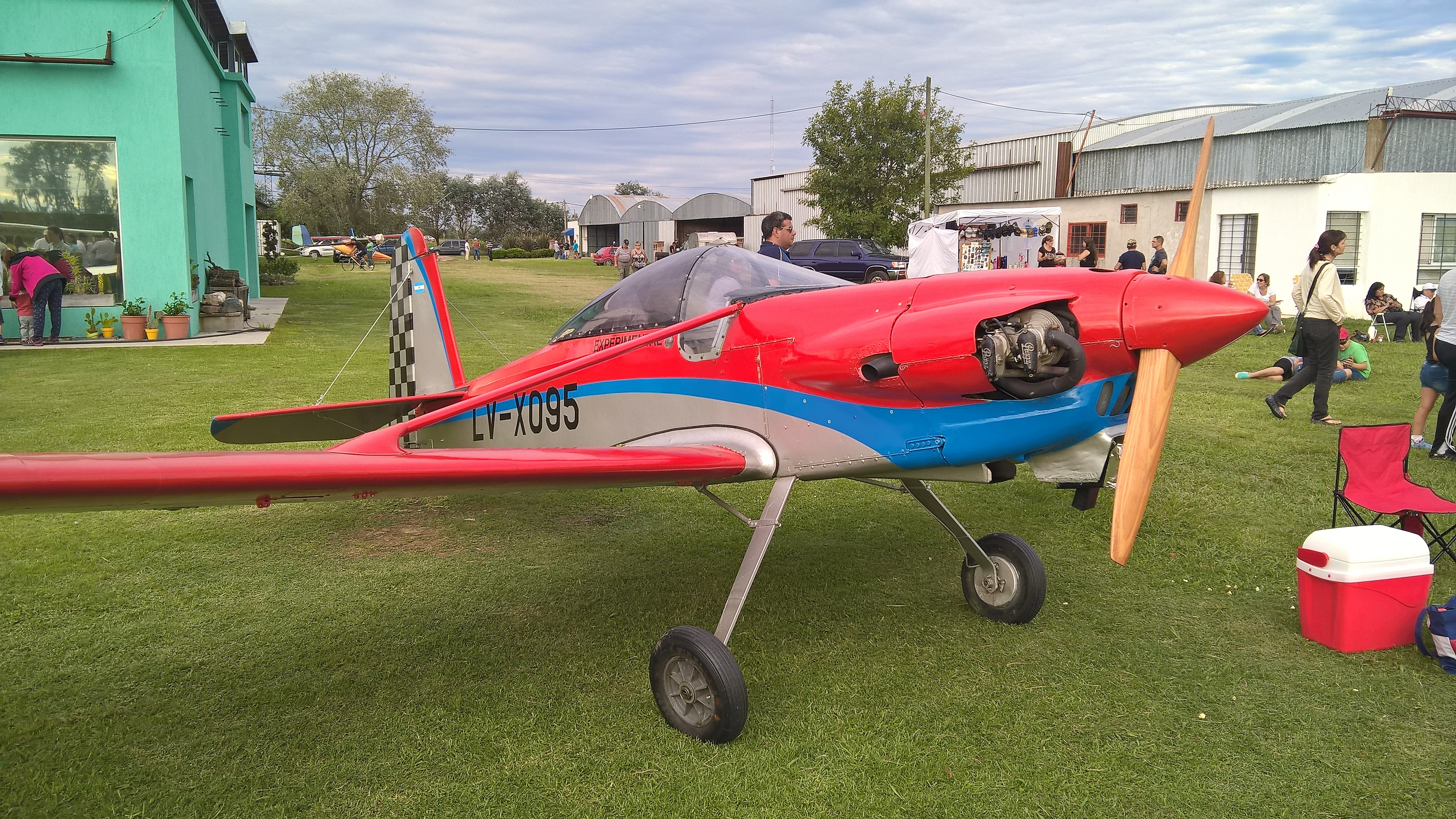 Yakstas LV-X095 en EAA Gral. Rodriguez 2017